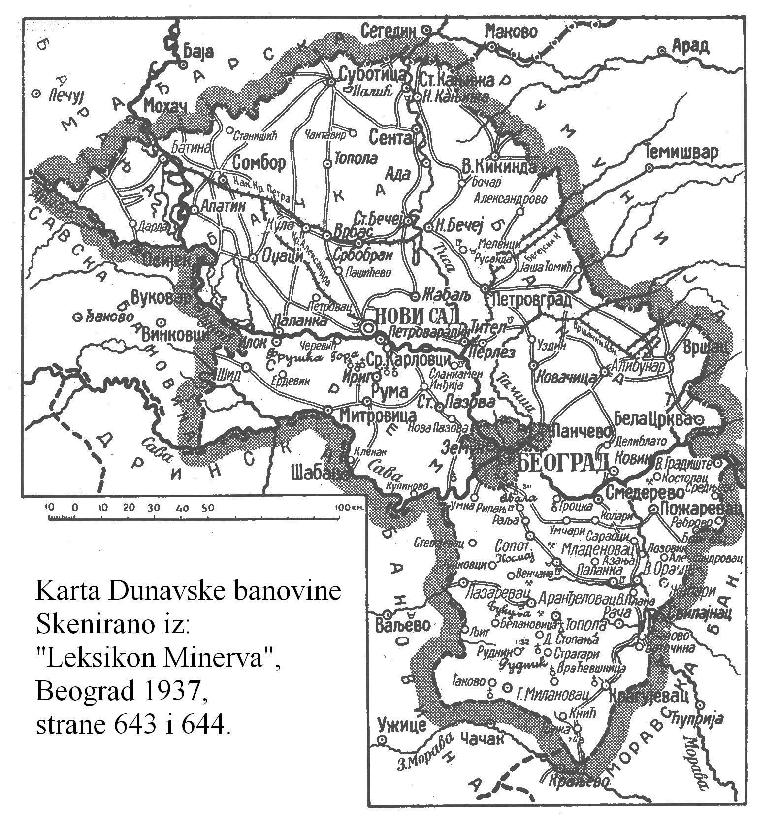 Карта Дунавске бановине.